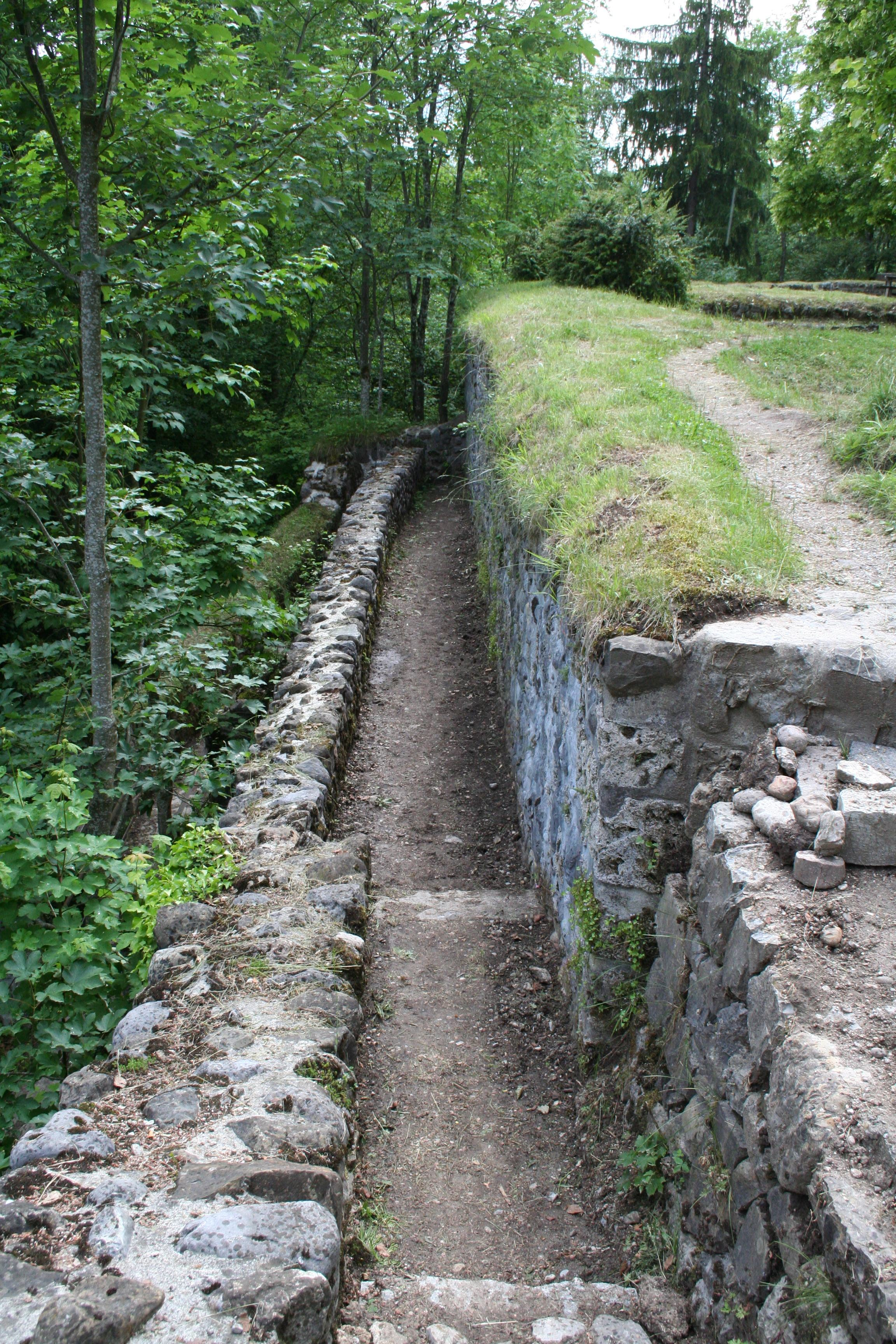 Ruine Alt-Landenberg südlicher Bering